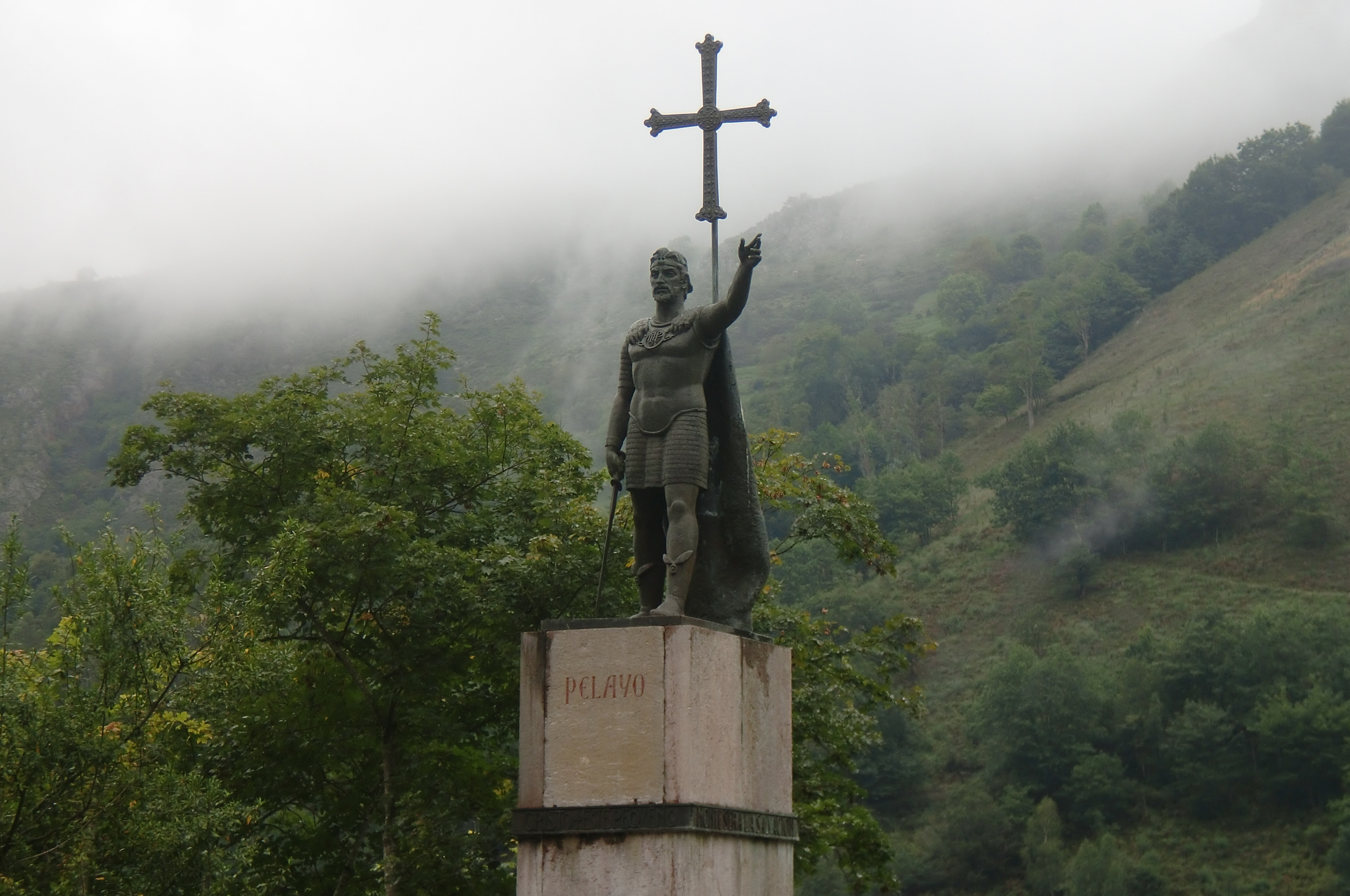 Primer Rey de Asturias